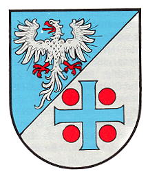 Wappen der Gemeinde Darstein.